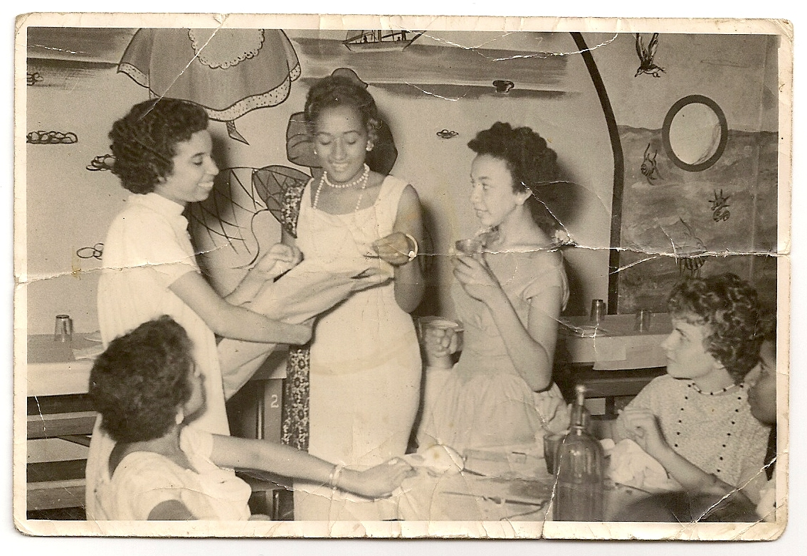 Viejas épocas.